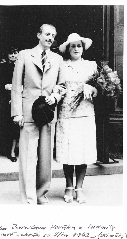 Ludmila Jiřincová a Jaroslav Novák - svatba 1942